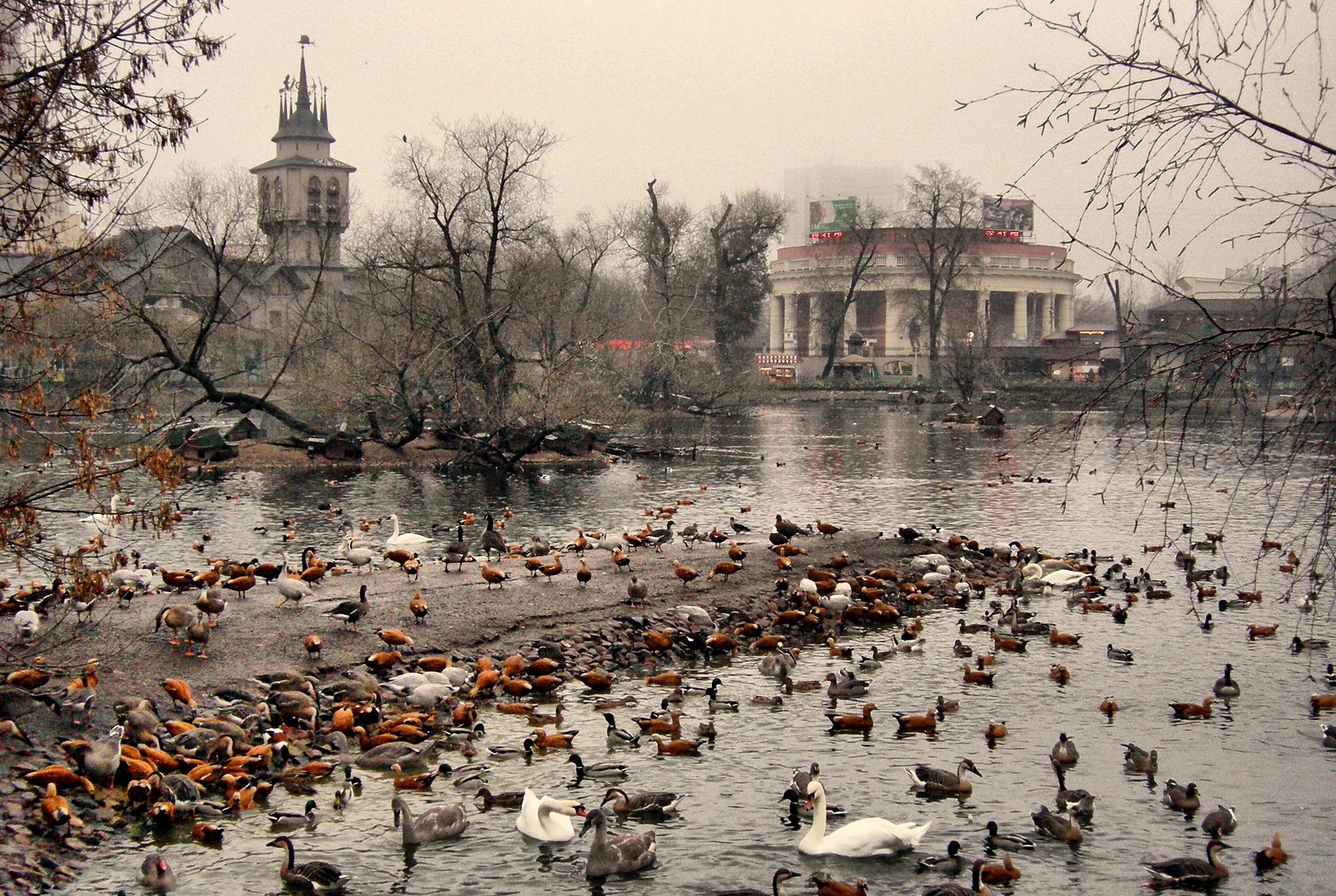 Московский зоопарк. Птицы.